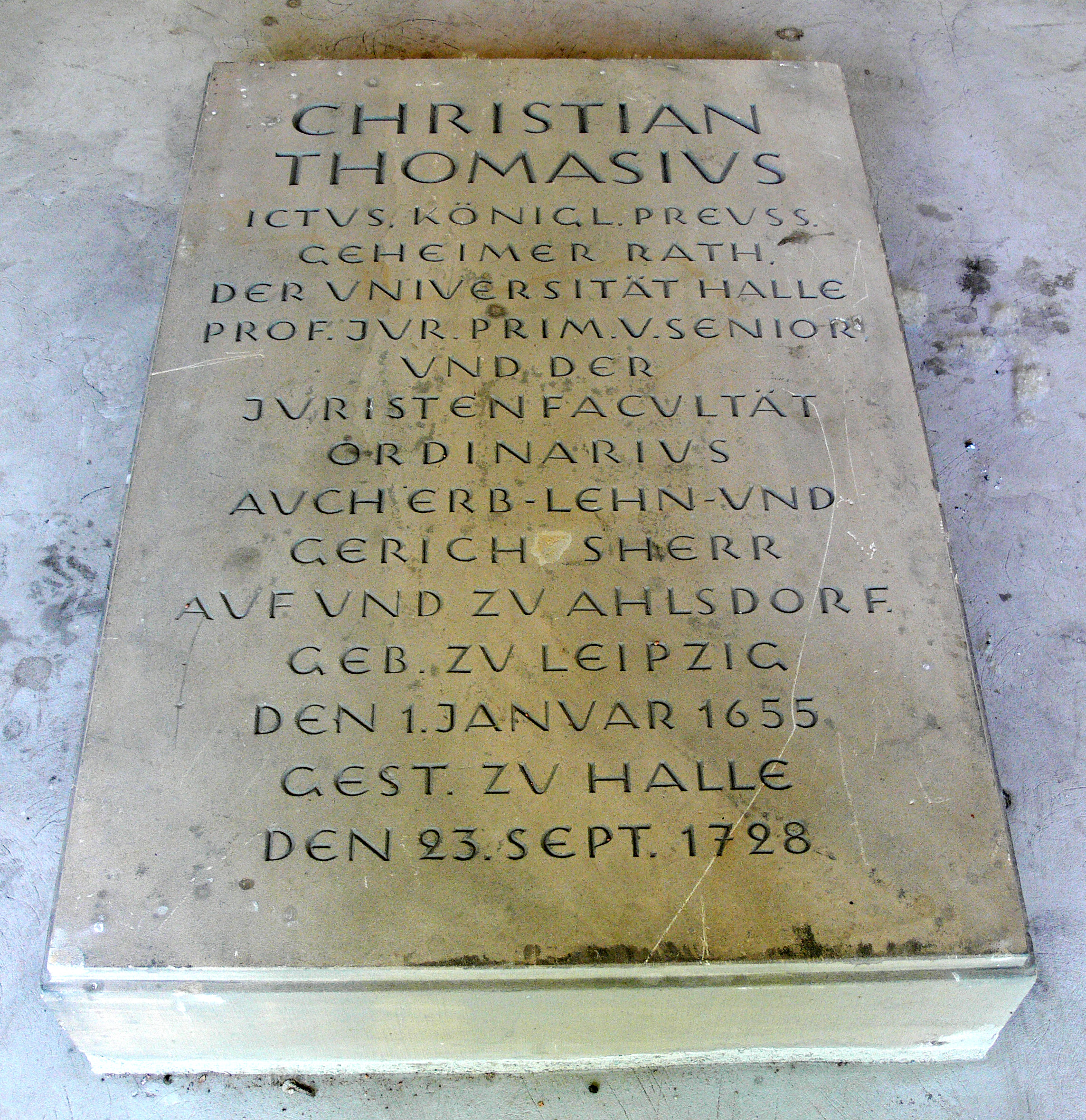 Stadtgottesacker, Halle an der Saale. Grab Thomasius.